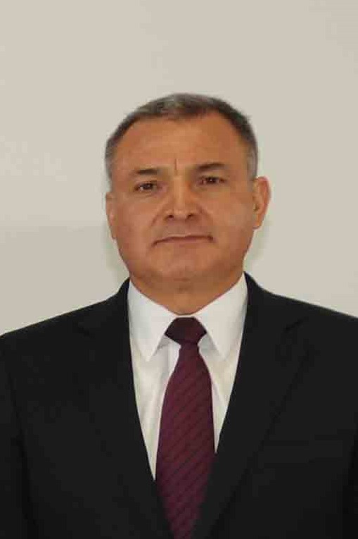 Reconocimiento por parte del gobierno de México a Michelle Michelle Leonhart, Administradora de la DEA.